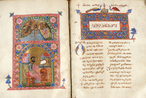 ვანის ოთხთავი